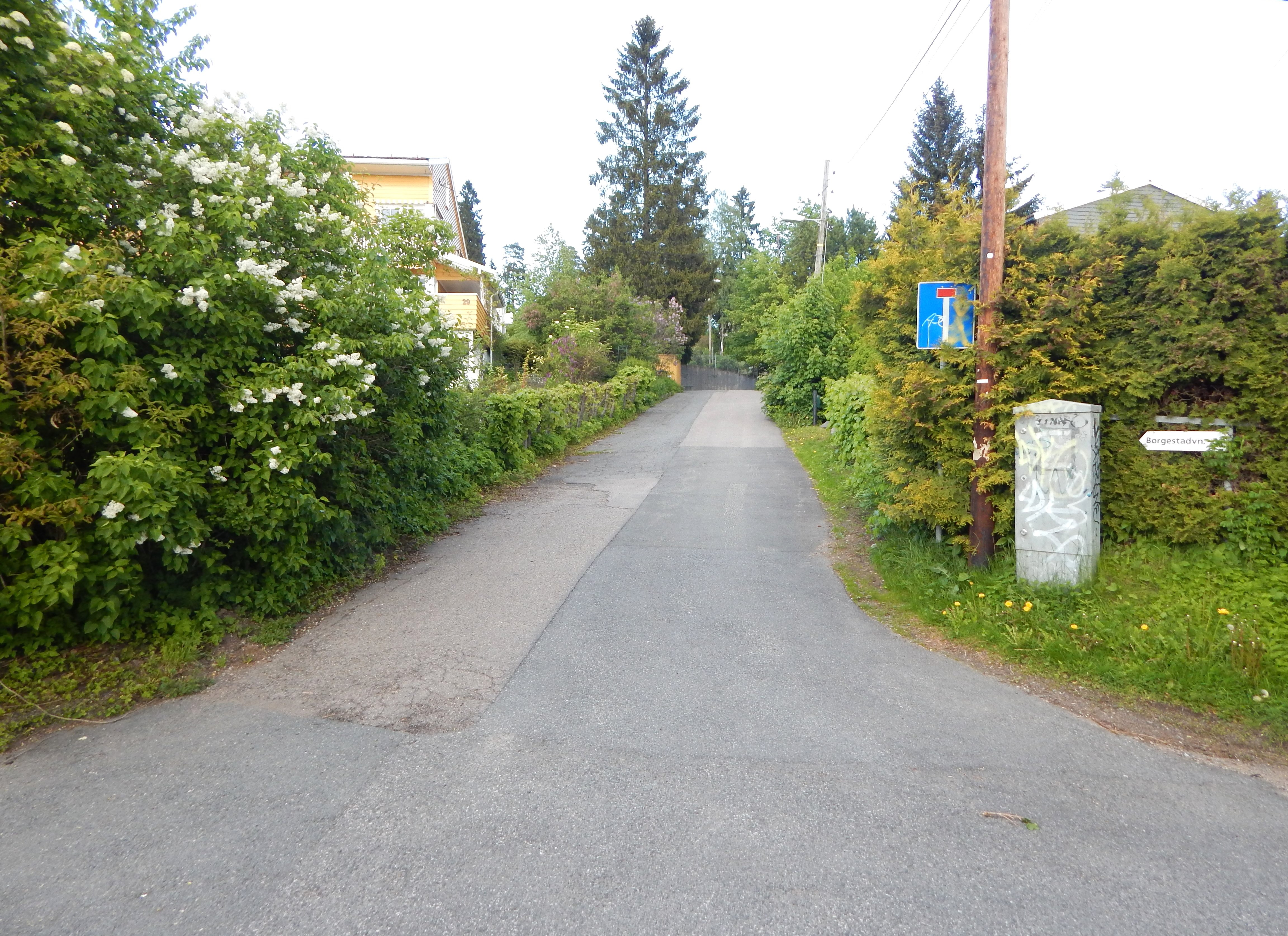 Borgestadveien oppover fra Kongleveien